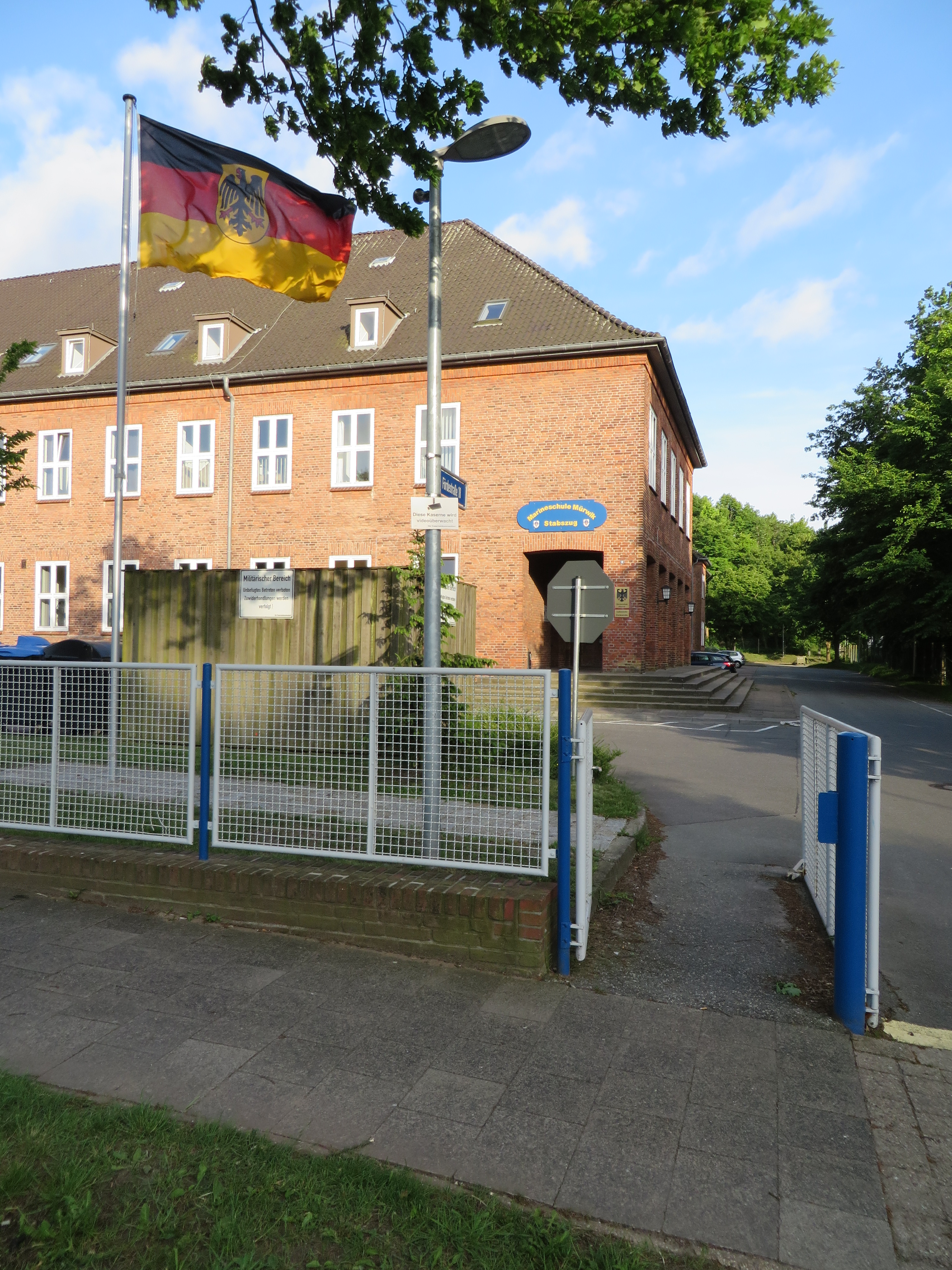 Marineschule Mürwik Stabszug, Zugang, bild 001